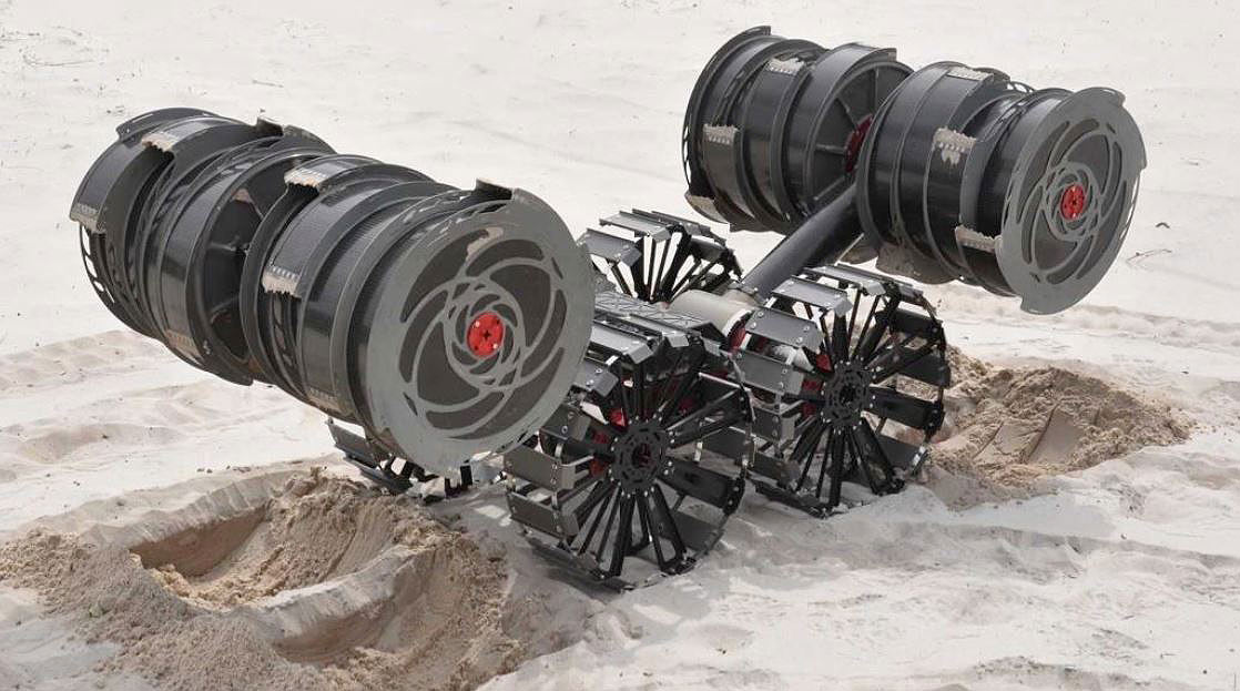 Prototype d'excavateur de la NASA RASSOR. Cet engin doit permettre de collecter du régolithe ou d'autres ressources minières sur la Lune ou Mars pour permettre une utilisation des ressources in situ